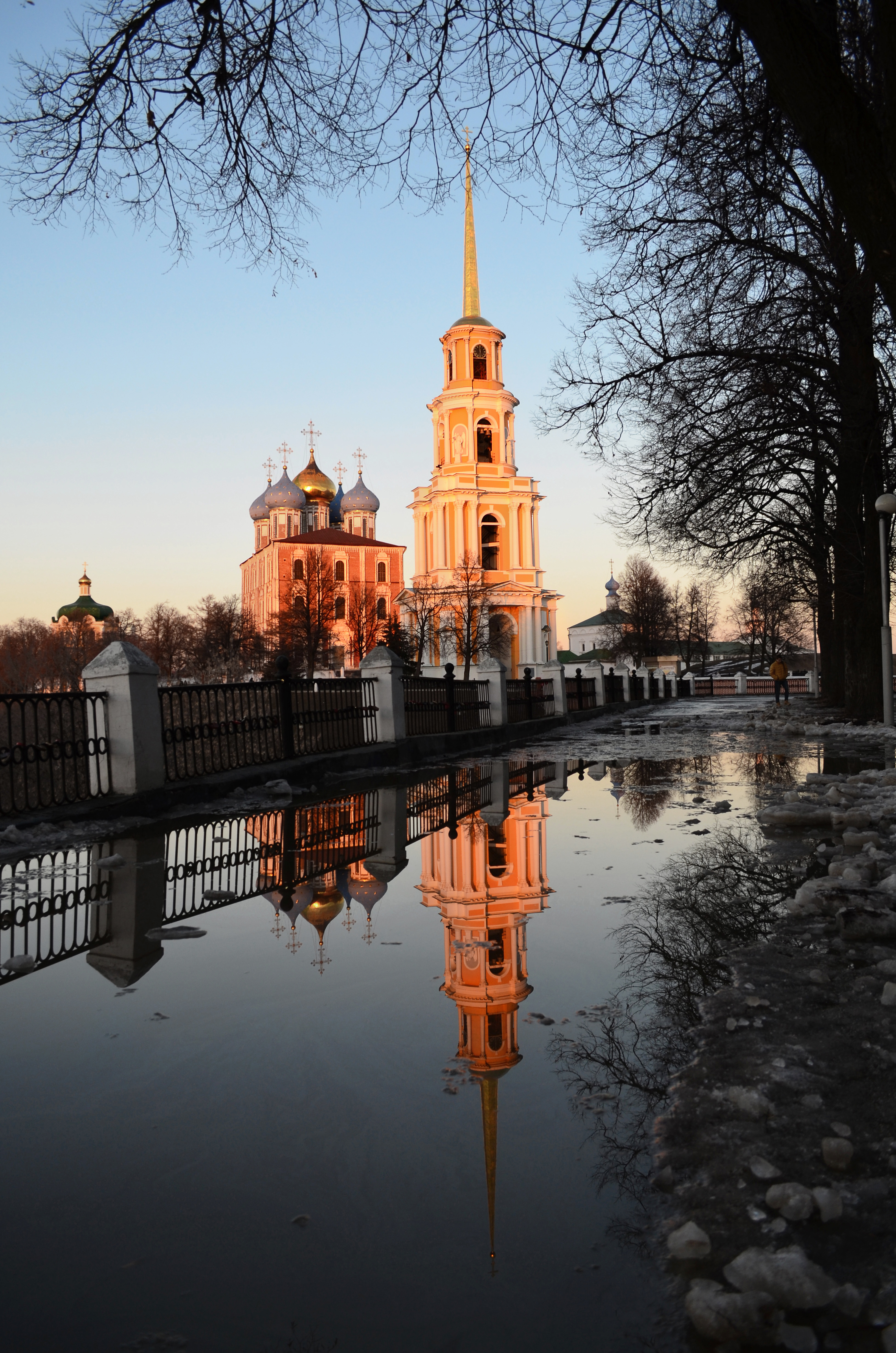 Рязань.Кремль.